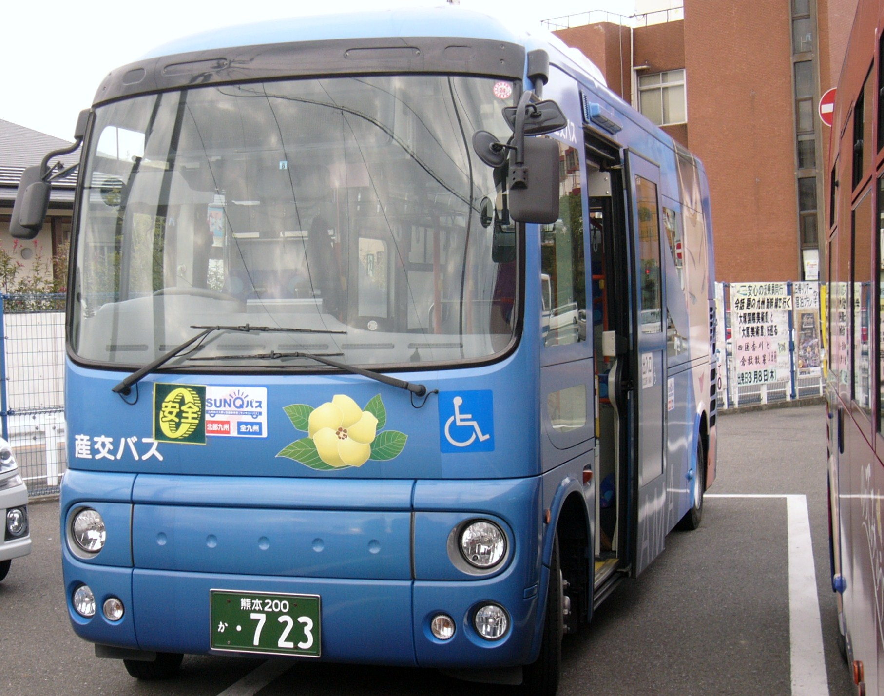 産交バス（本渡市街地循環バス（のってみゅうかー））